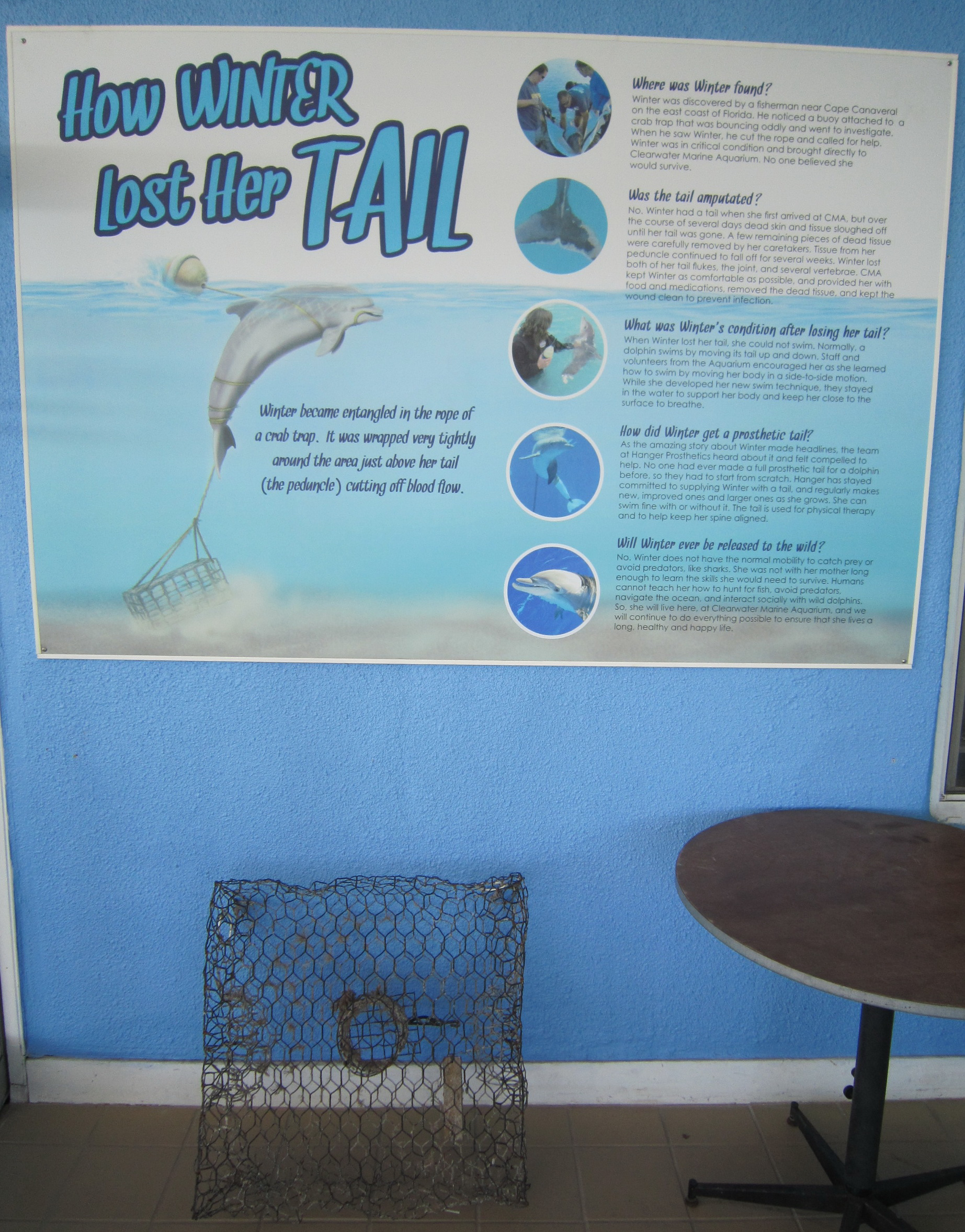 crab trap_winter